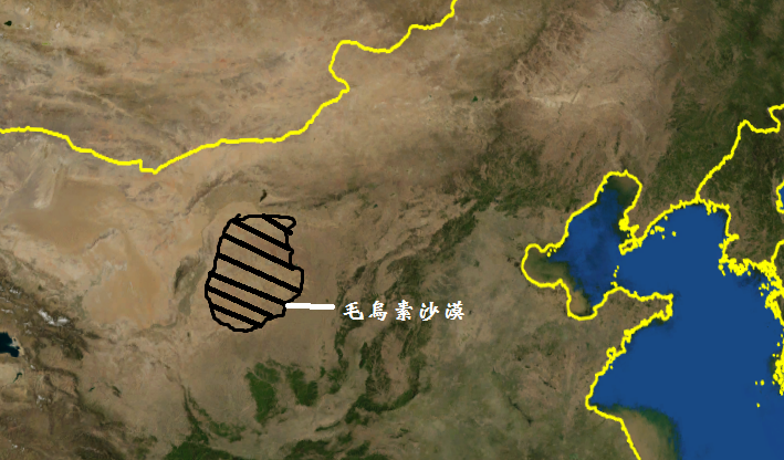 中國毛烏素沙漠位置